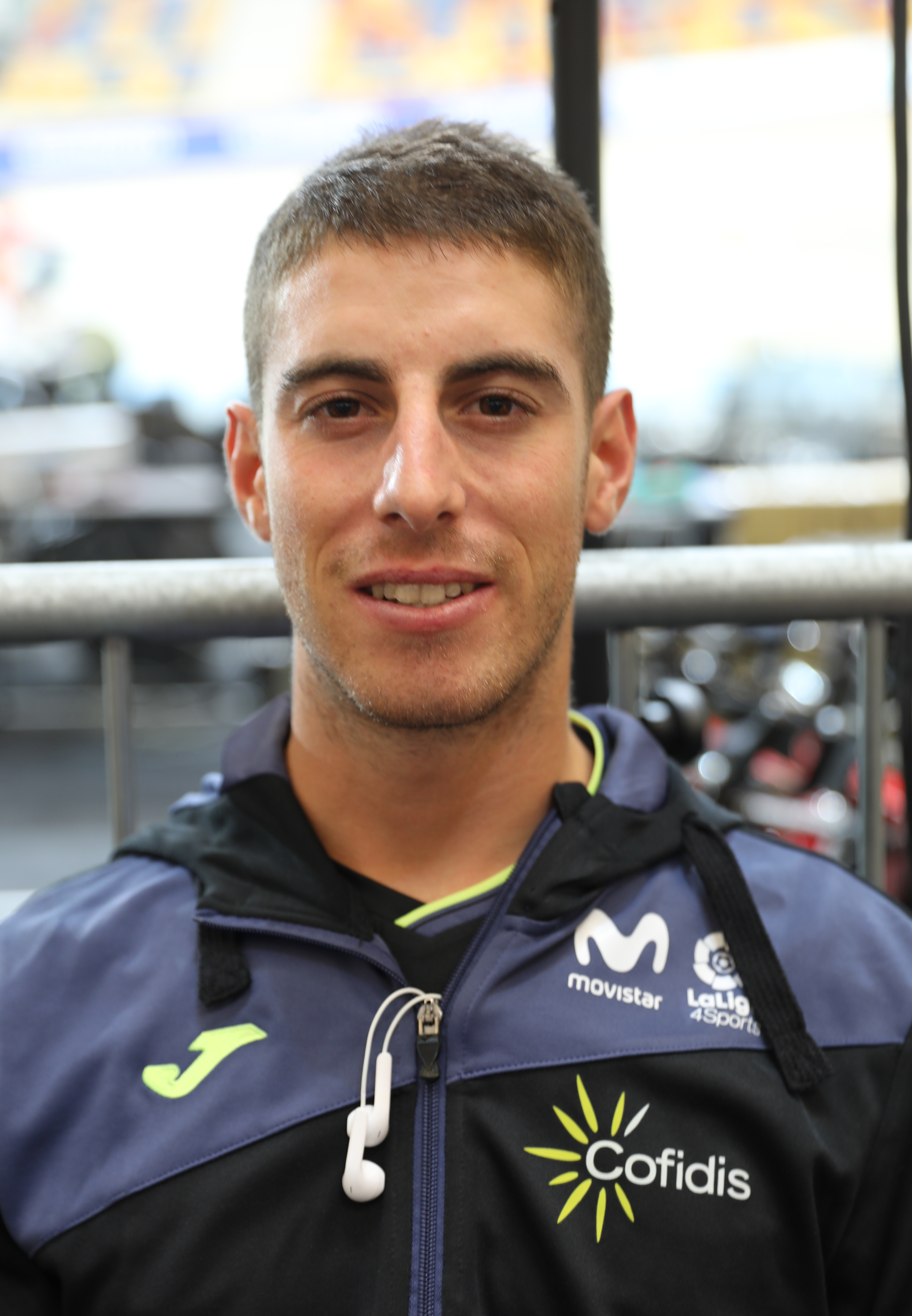 Óscar Pelegrí Ferrandis, spanischer Radsportler